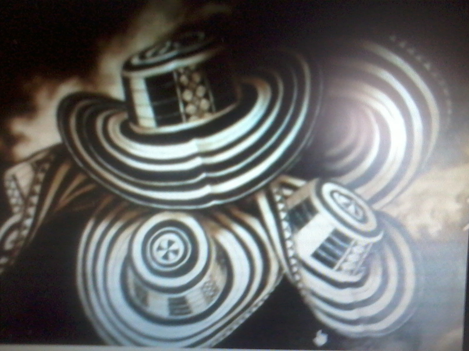 sombreros